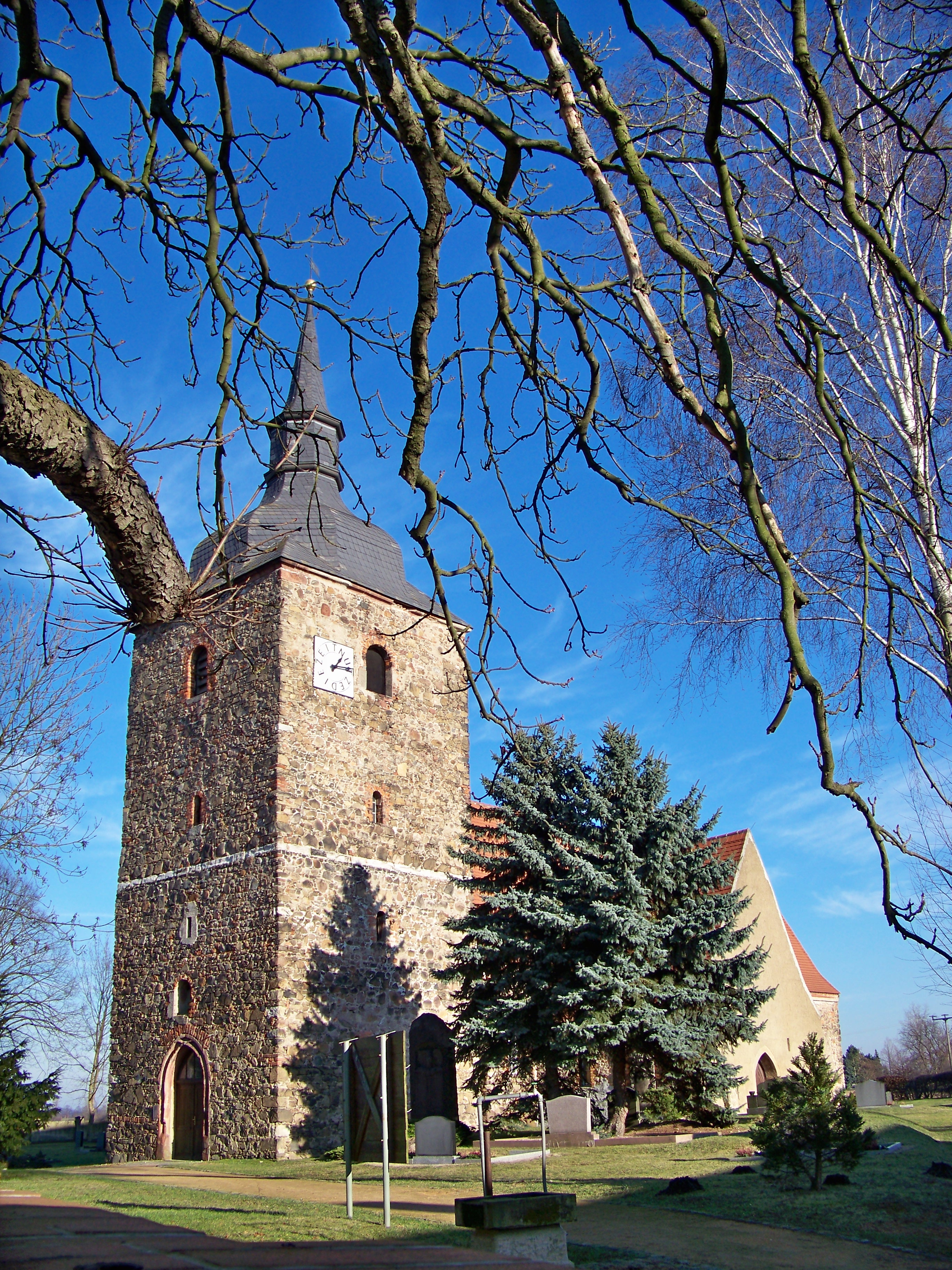 Dorfkirche in Liemehna (bei Eilenburg), 1209 erbaut, im Dreißigjährigen Krieg zerstört und von 1658 bis 1660 wieder aufgebaut